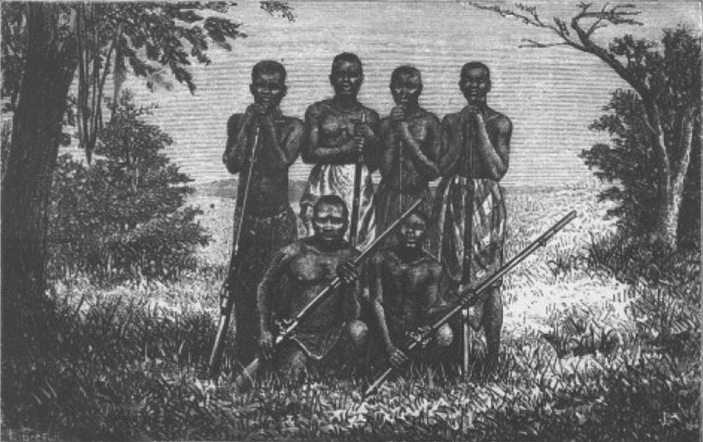 "Chasseurs pahouins venus au Gabon pour vendre de l’ivoire" (Louis Dupont, marquis de Compiègne, L'Afrique équatoriale, fig. 164